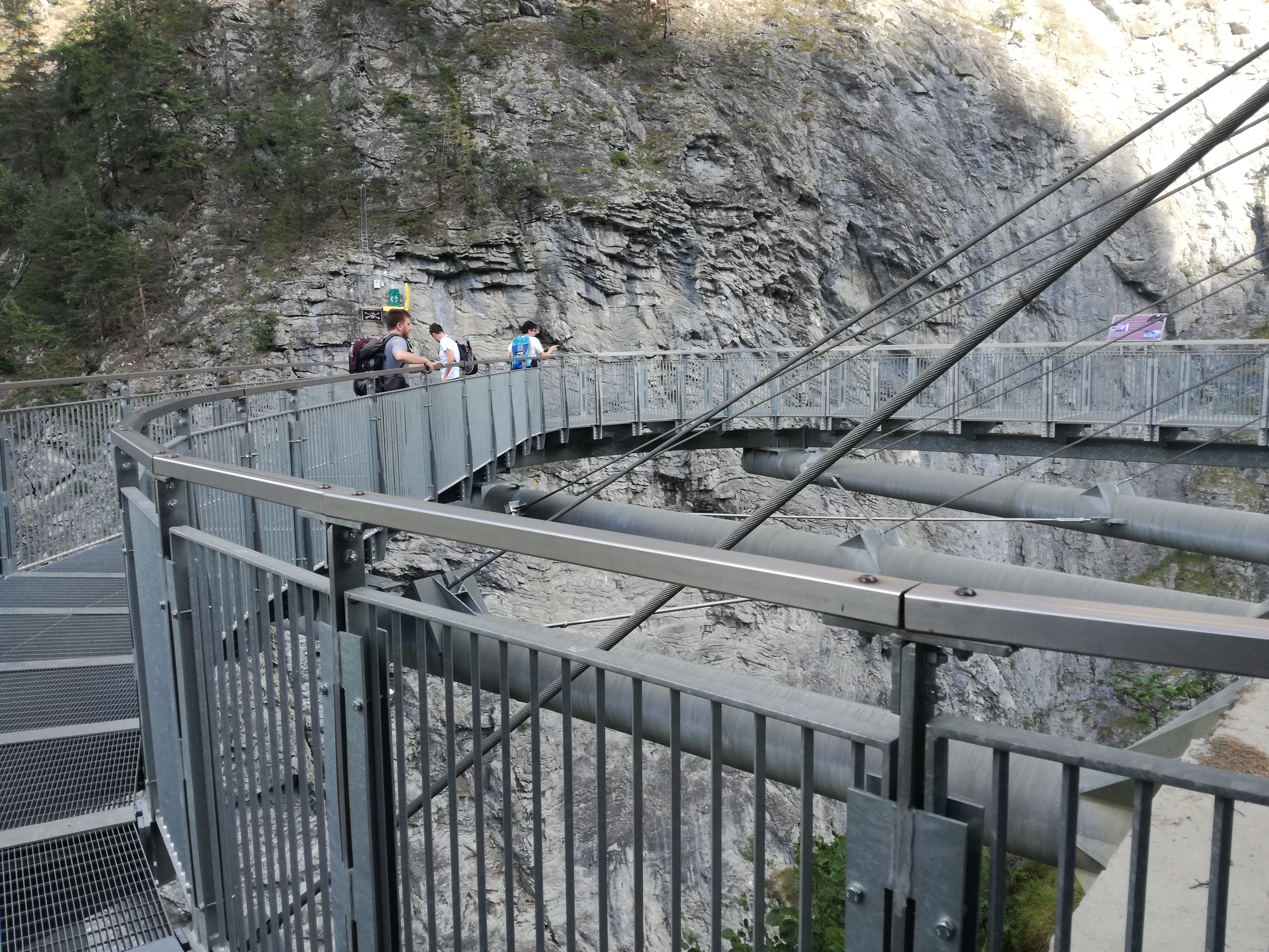 Passerella sull'orrido di Pré-Saint-Didier